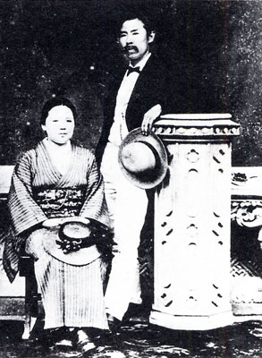 結婚後すぐの新島襄と八重